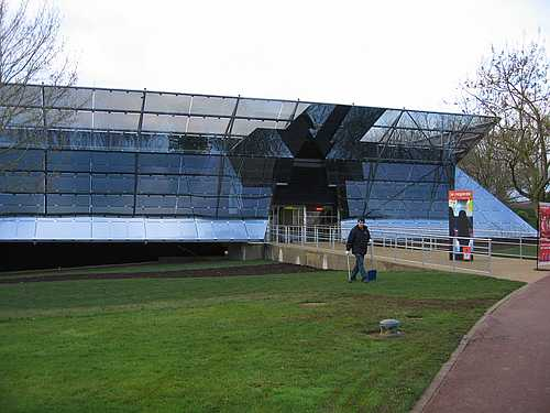 Le Pavillon des Robocoasters au Parc du Futuroscope (C) Peter Hacker 2006-03-29 - serial no. 891-9149 Licensing Photographie personnelle de PeterHacker.